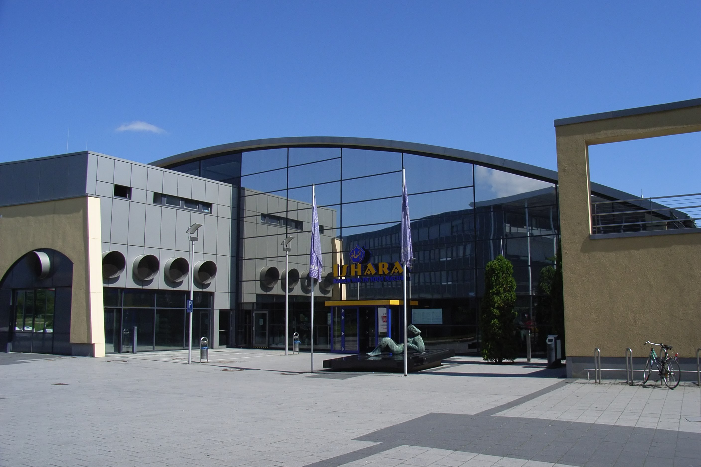 Bielefeld, Deutschland: Schwimmbad Ishara.